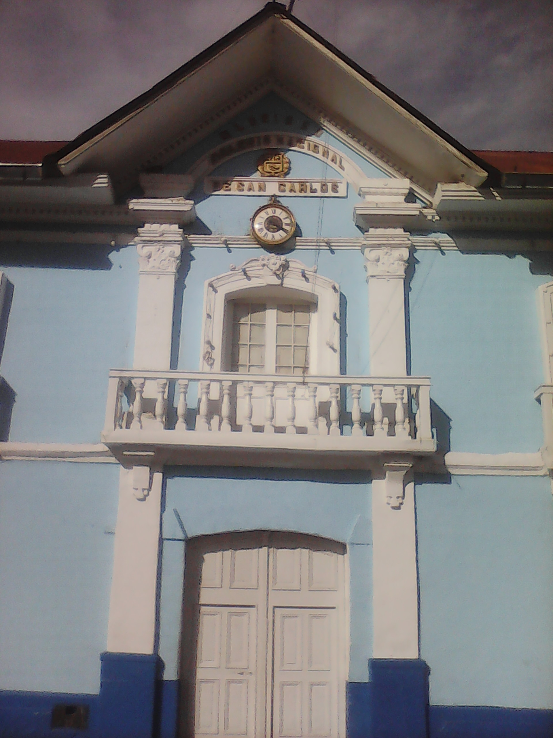 Glorioso Colegio Nacional de San Carlos de Puno. 20160830 151854